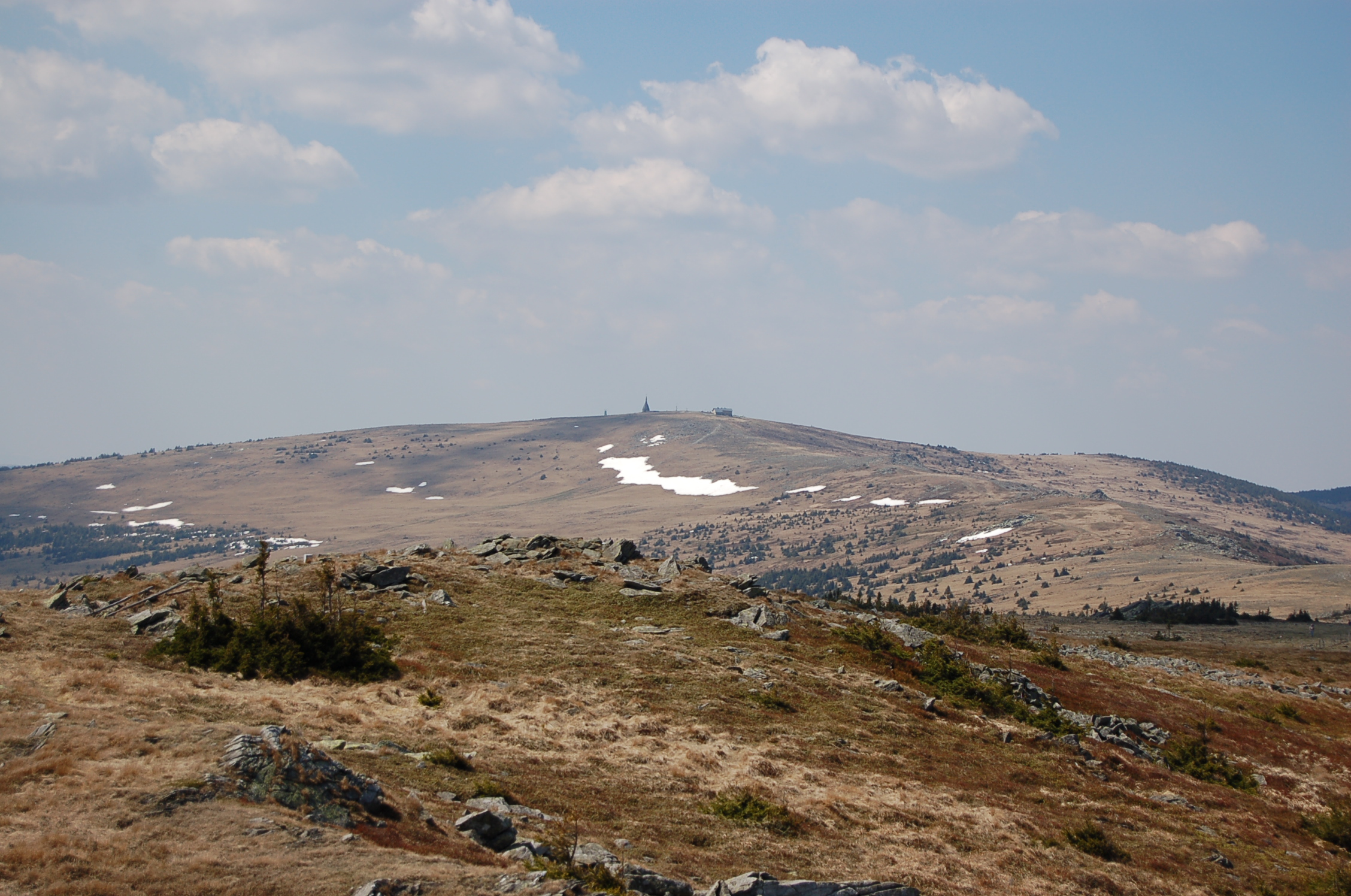 Hochwechsel, gesehen von Niederwechsel